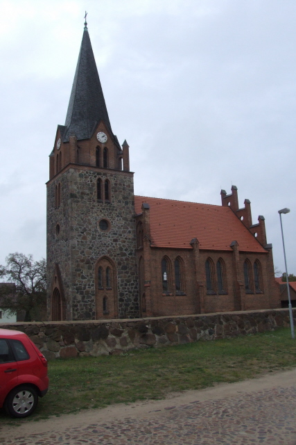 Dorfkirche Nichels Fotograf: Harald Rossa Datum: November 2006 Höher aufgelöste Version ist verfügbar